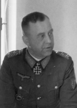 Title: Rumänien, Otto Wöhler bei Lagebesprechung People in the image: Wöhler, Otto: General der Infanterie, Ritterkreuz, Heer, Deutschland (GND 129199729) Factual corrections and alternative descriptions are encouraged separately from the original description. Additionally errors can be reported at this page to inform the Bundesarchiv. Original historic description: Prop.-Kp. 637 Film-Nr.: 3462/7A Bildberichter: Mittelstaedt Text: ders. Ort: Barlad (Rumänien) Datum: 11.4.44 Text: Der Oberbefehlshaber einer Heeresgruppe im Osten, Eichenlaubträger Generaloberst Schörner bei einer Lagebesprechung mit dem Oberbefehlshaber einer Armeegruppe, Ritterkreuzträger General der Inf. Wöhler.